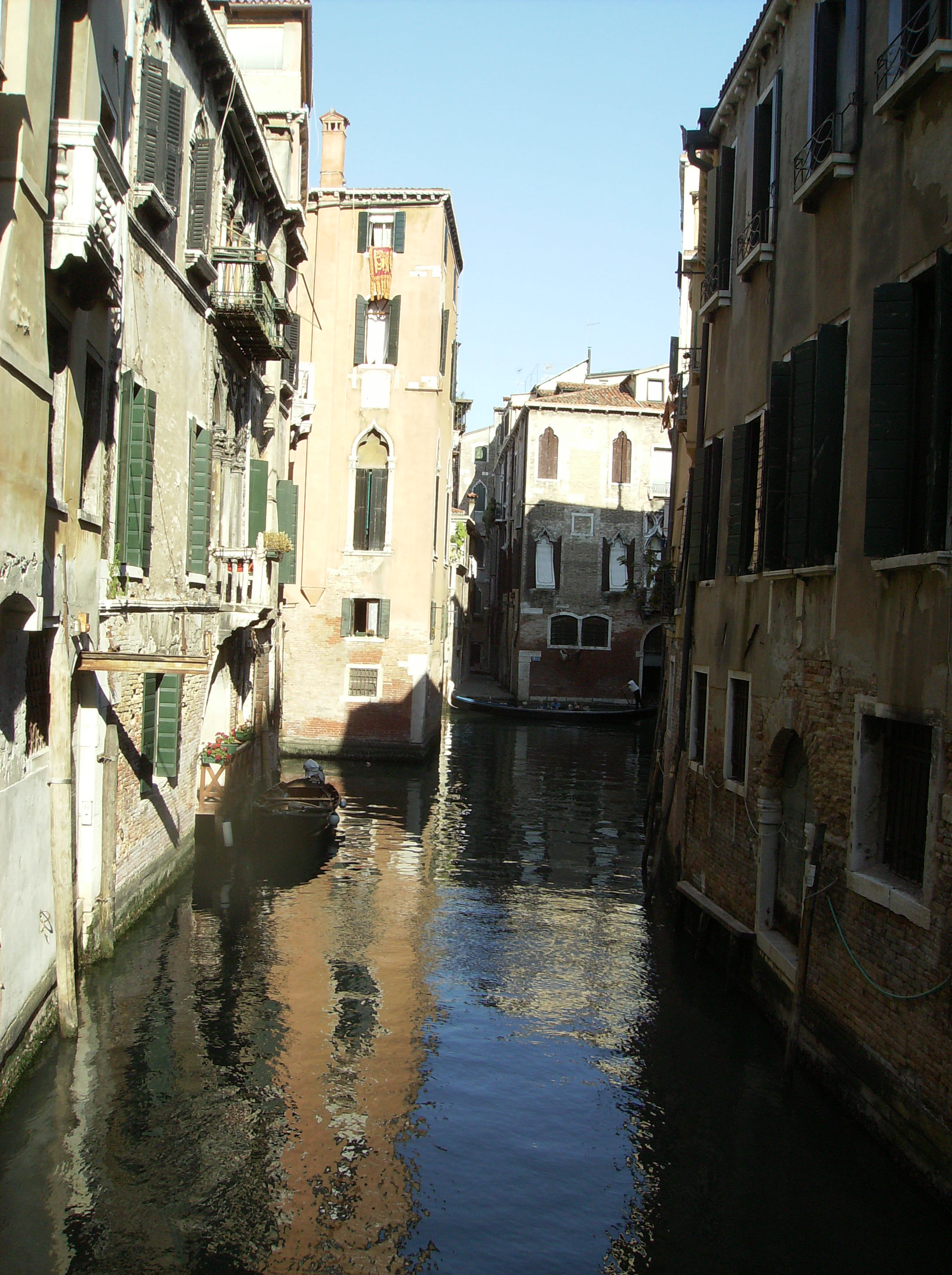 rio fontego venise